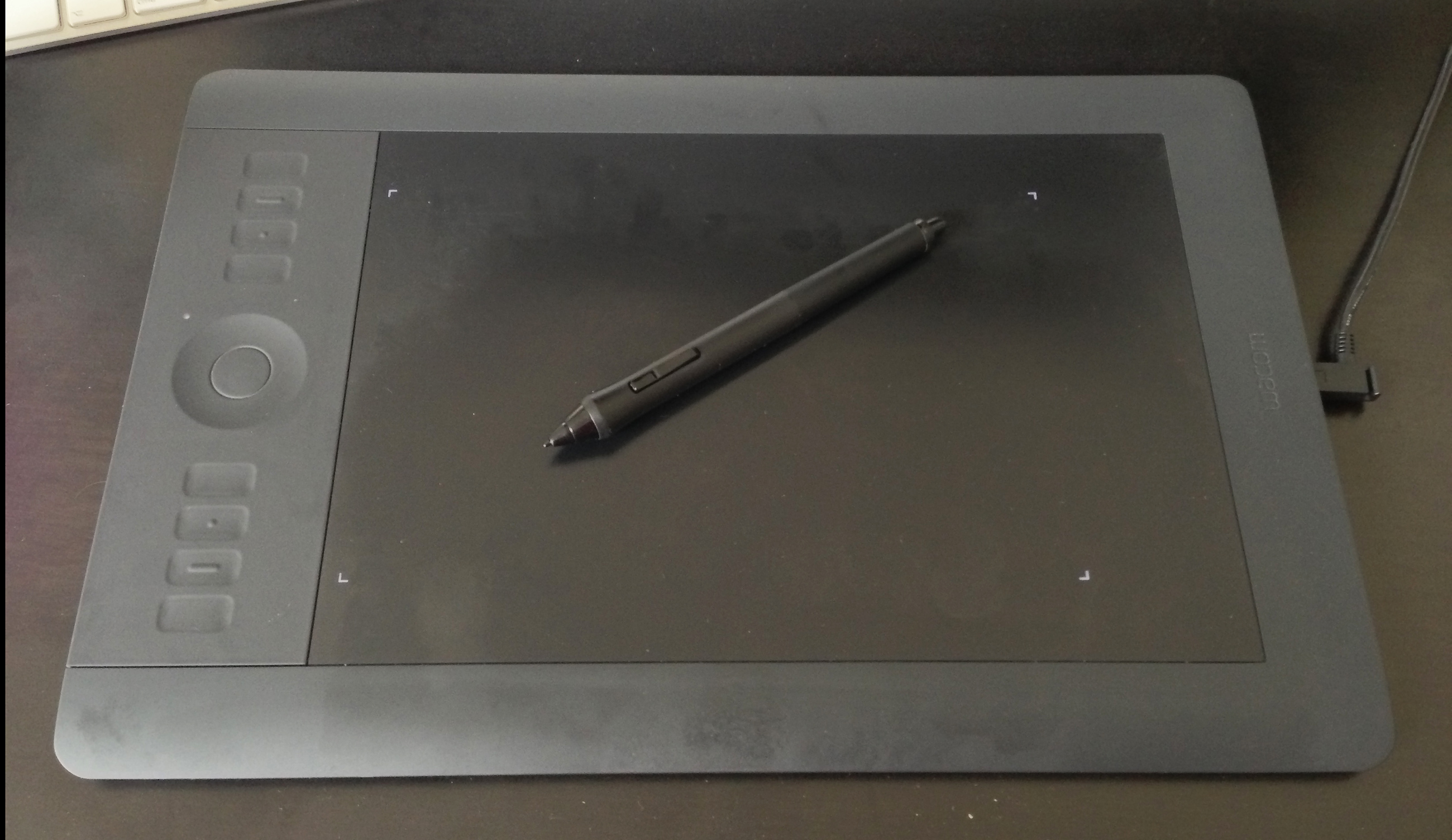 Tablette Wacom Intuos5 M La surface centrale est plus lisse après quelques mois d'utilisation intensive.